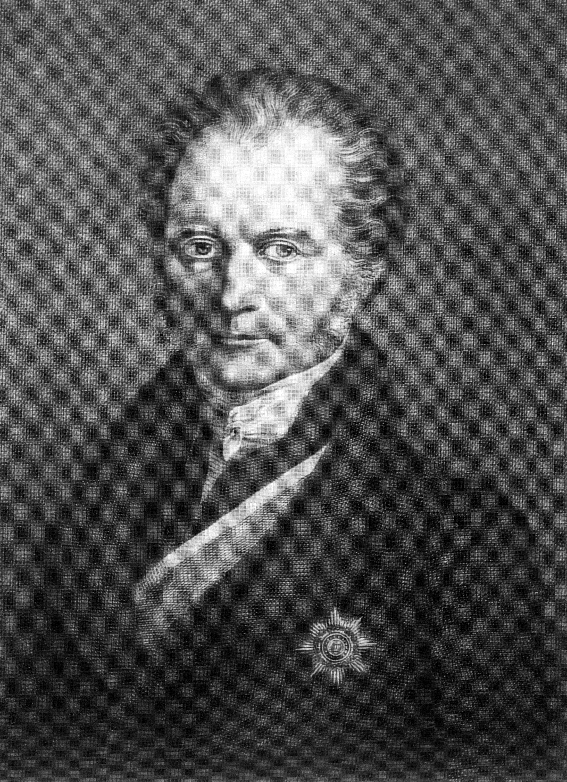 Johann Adam Freiherr von Aretin (1769-1822)